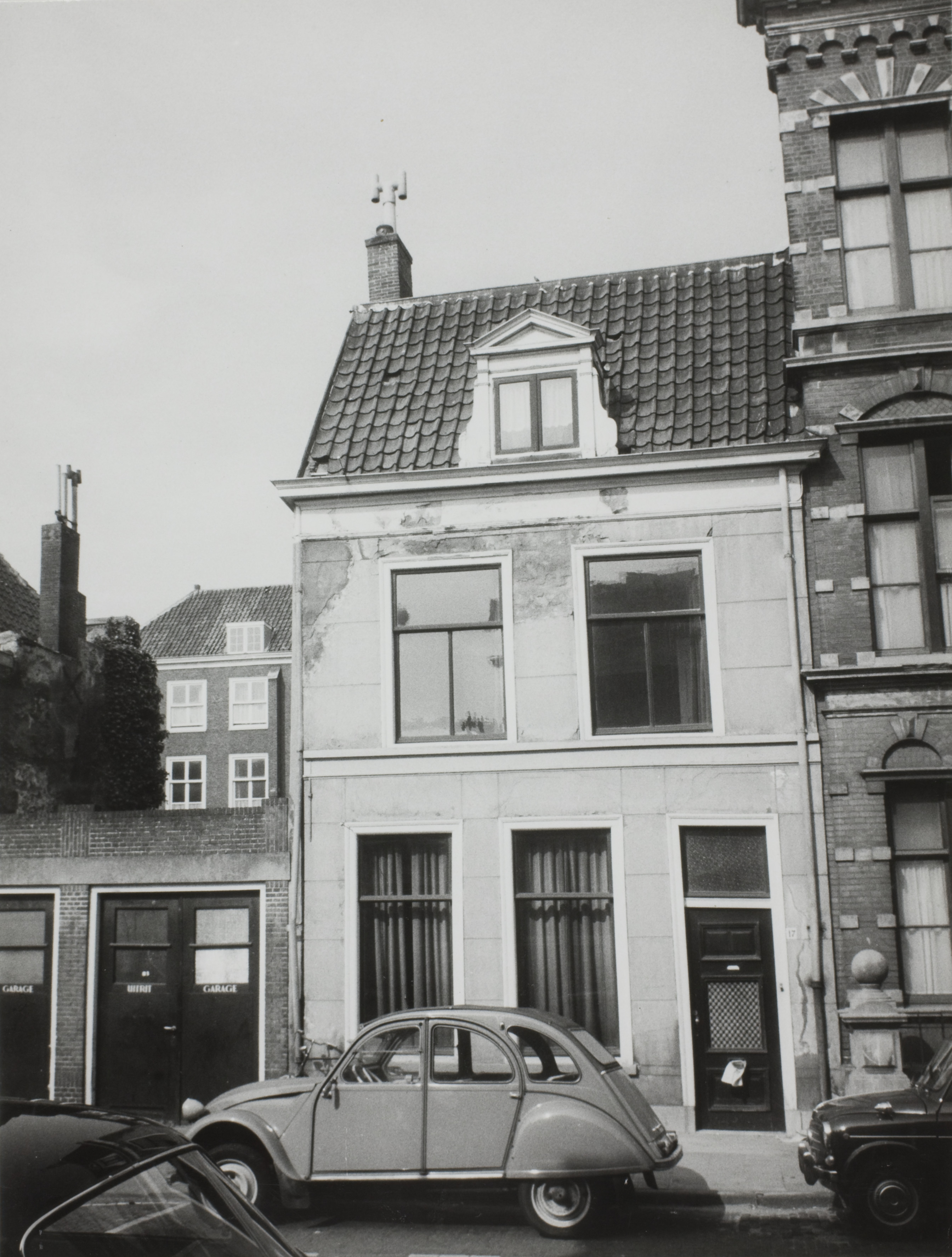 Voorgevel Papengracht 17. Collectie: Topografisch Historische Atlas. Datum vervaardiging: 1972